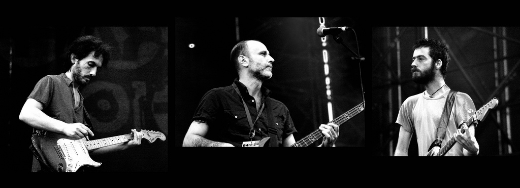 rammarico per non avere una fotto di VIttoria da aggiungere all composizione :(